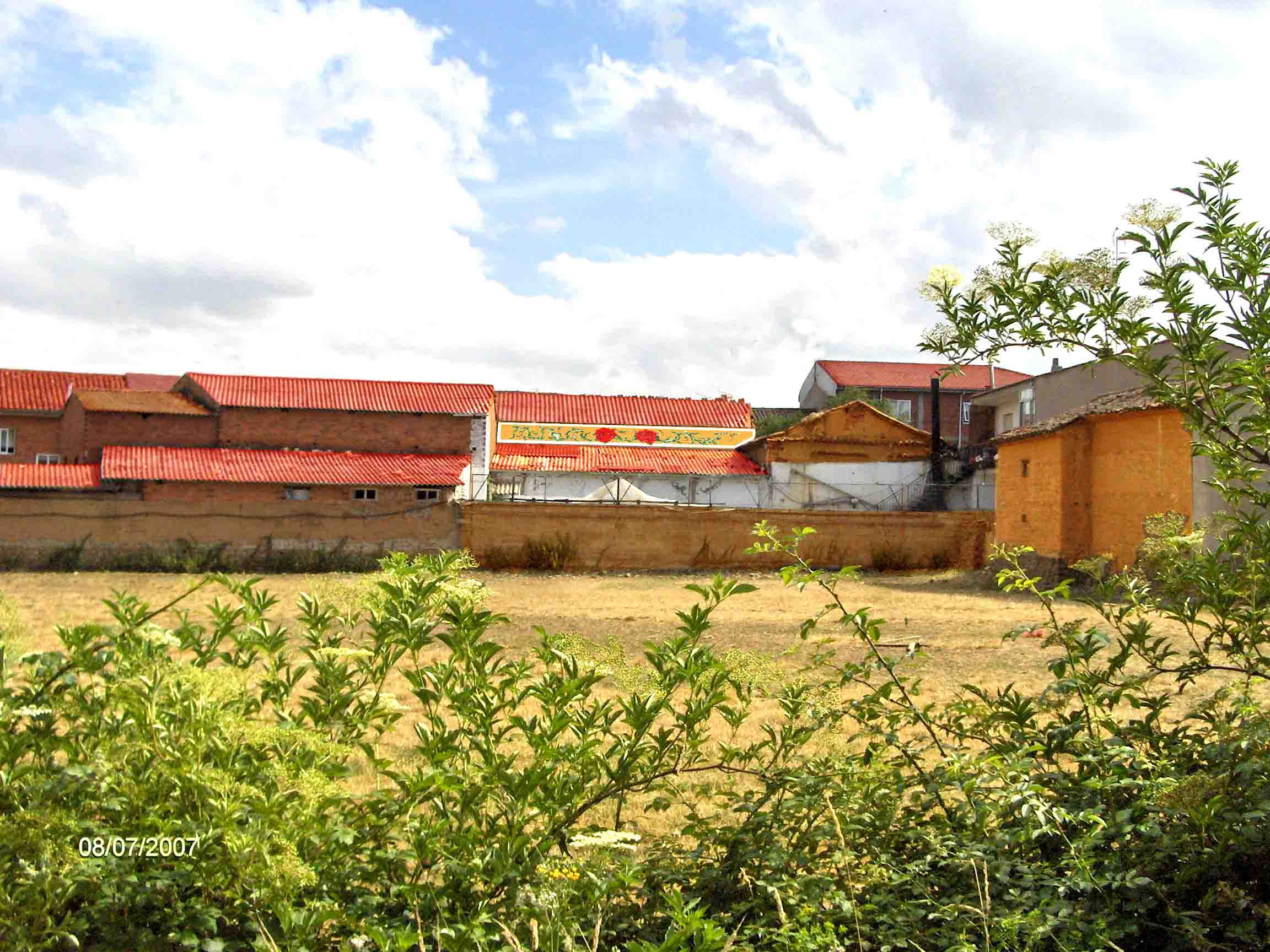 Vista panoramica de Santiago del Molinillo, en el municipio de Las Omañas (León, España)